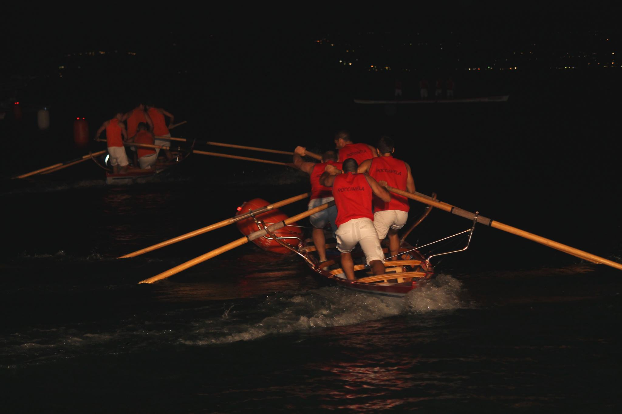 Bissa intenta nel gesto tecnico del giro boa